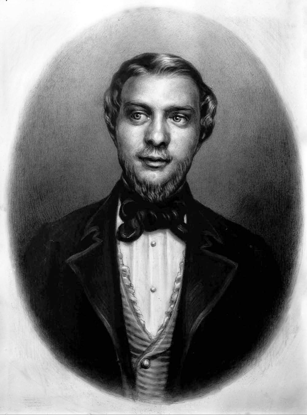 Ritratto del 1853